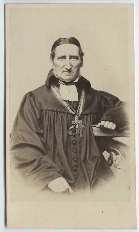 Portree: Carl Georg Fick, Keila Miikaeli koguduse adjunkt 1827–1828 ja õpetaja 1828–1883 Lääne-Harju praostkonna praost 1835–1870